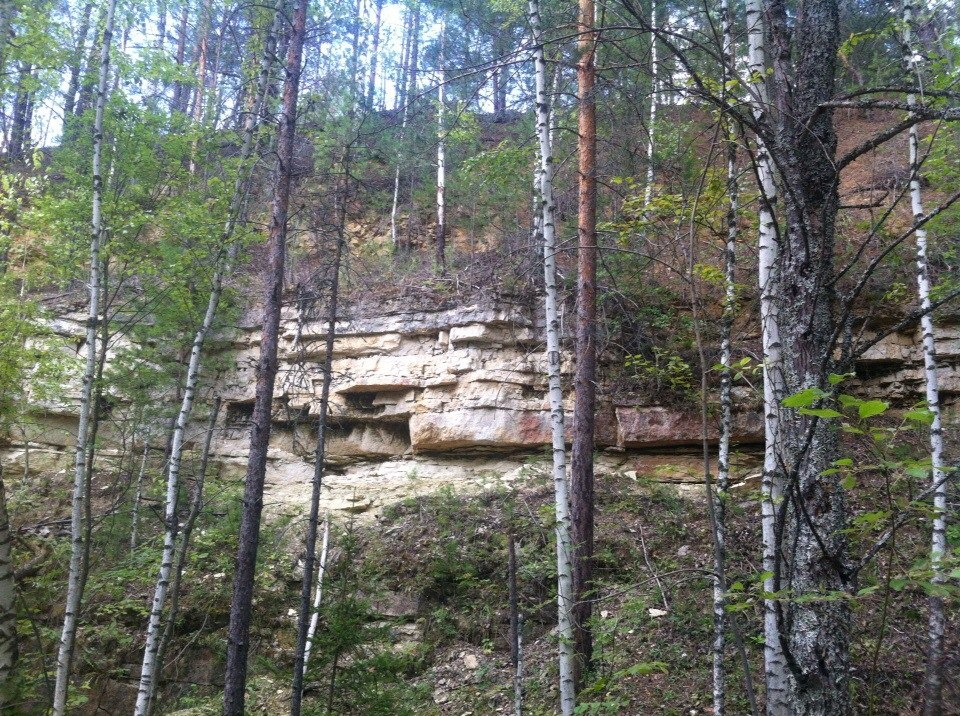 Щербатовские известняки, Касимовский район This image is related to the protected area of Russia number 6210040